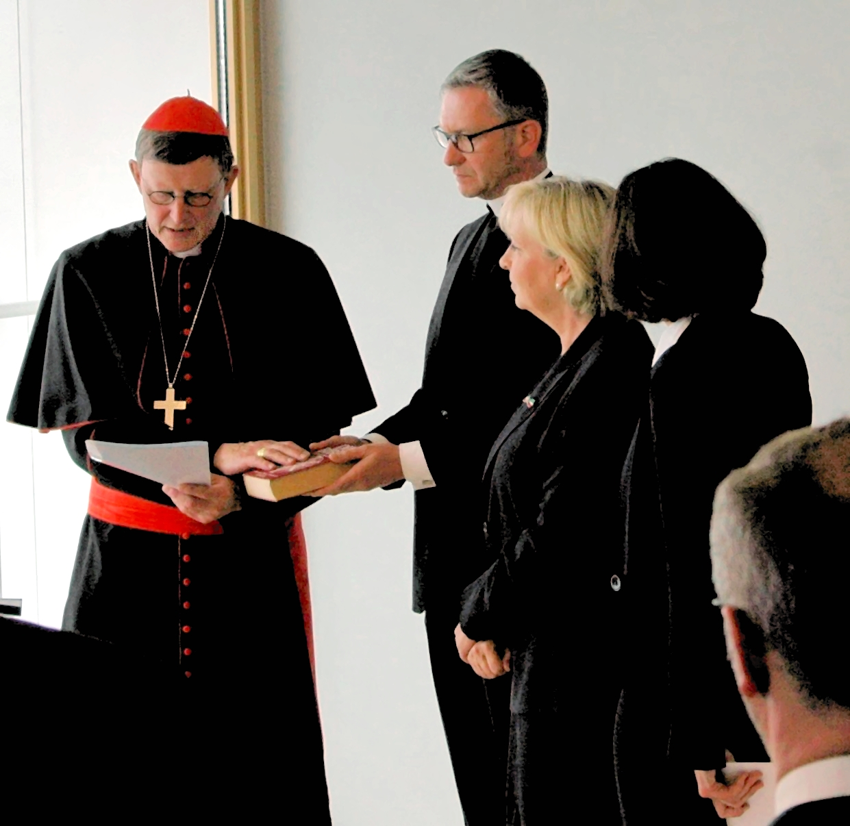 Besuch anlässlich der Abnahme des Treueeides von Rainer Maria Kardinal Woelki als neuer Erzbischof von Köln und Eintrag in das Gästebuch der Landesregierung in der Staatskanzlei NRW